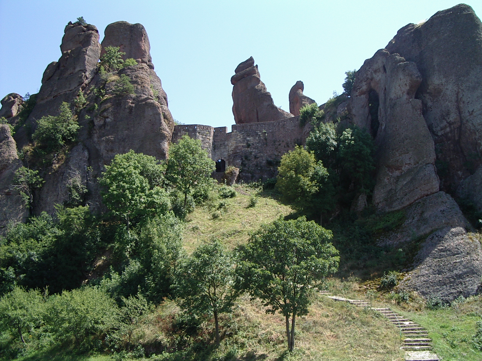 Belogradchik castle - Bulgaria